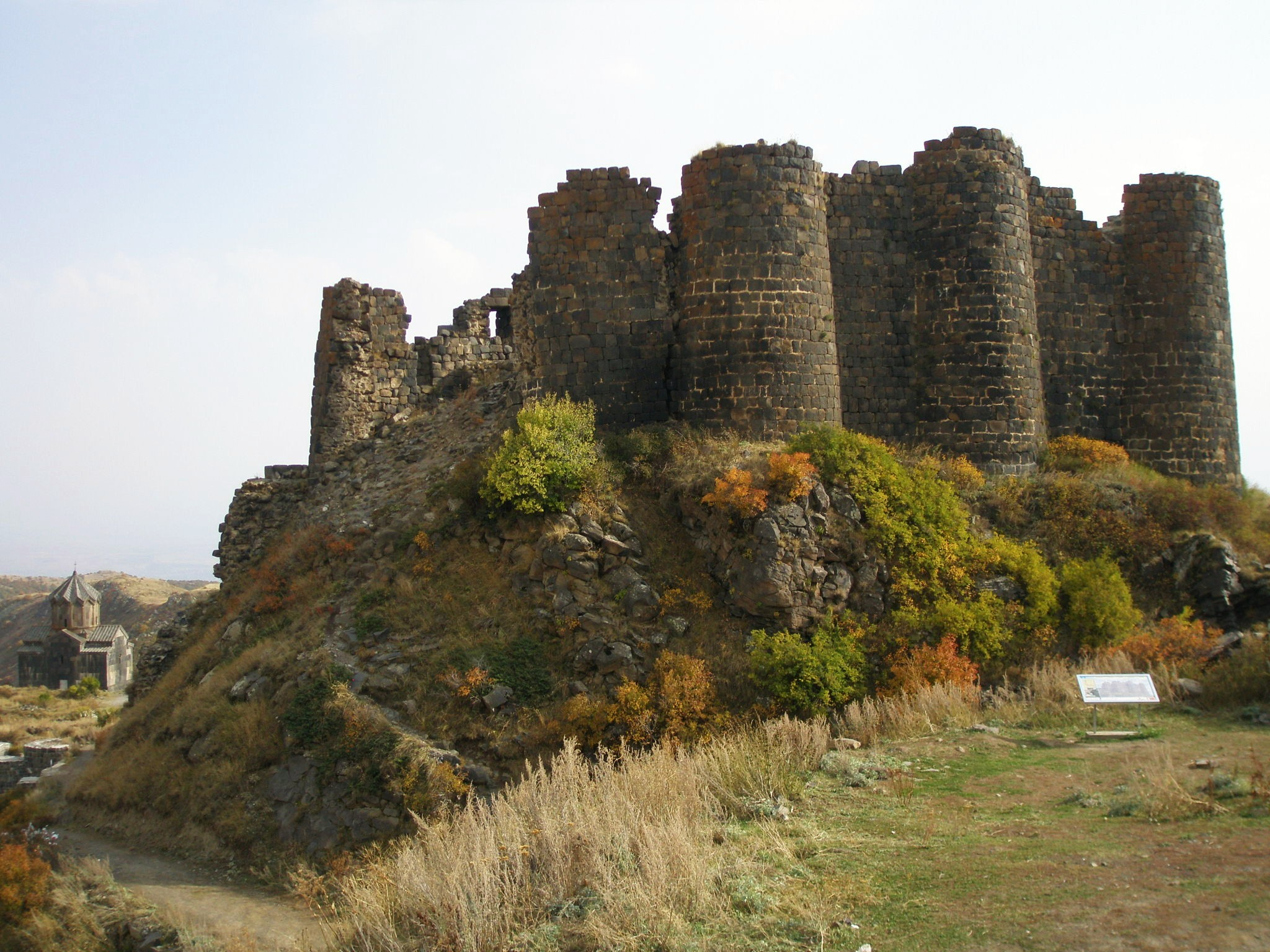 Amberd Fortress